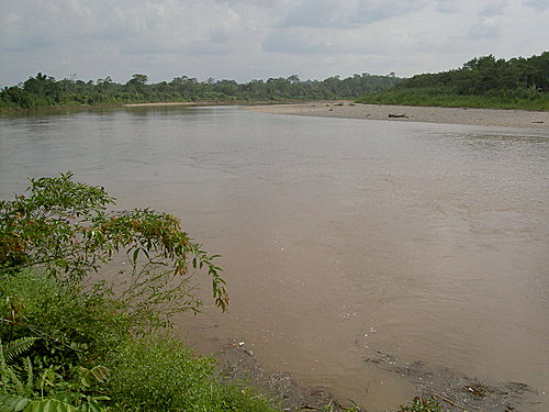 Rio San Miguel en Colombia